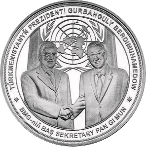 Памятная монета Туркменистана